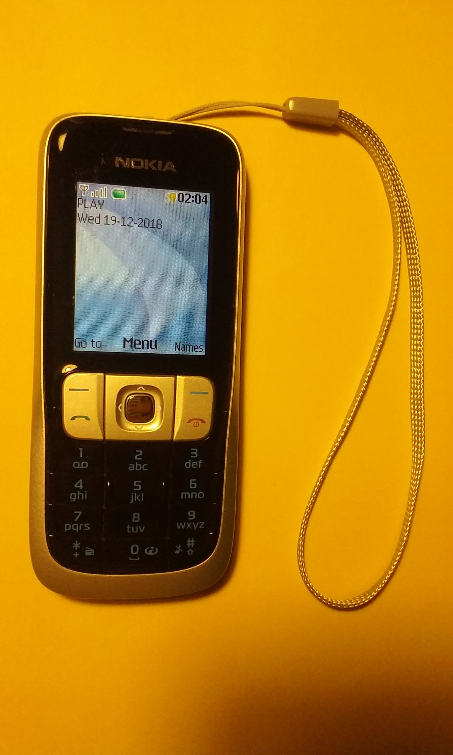 Nokia 2630 w polskiej sieci Play pod koniec 2018 roku